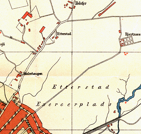 Norsk (bokmål): Kart over Etterstad i Østre Aker, 1887. Bygdevegen fra Kristiania til Strømmen går forbi garden. Innafor Kristianias grense ses noe av bebyggelsen på Vålerenga.